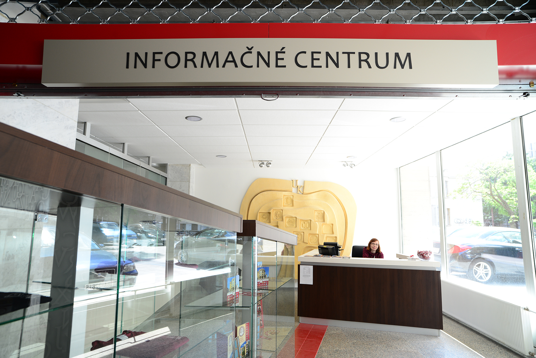 informačné centrum